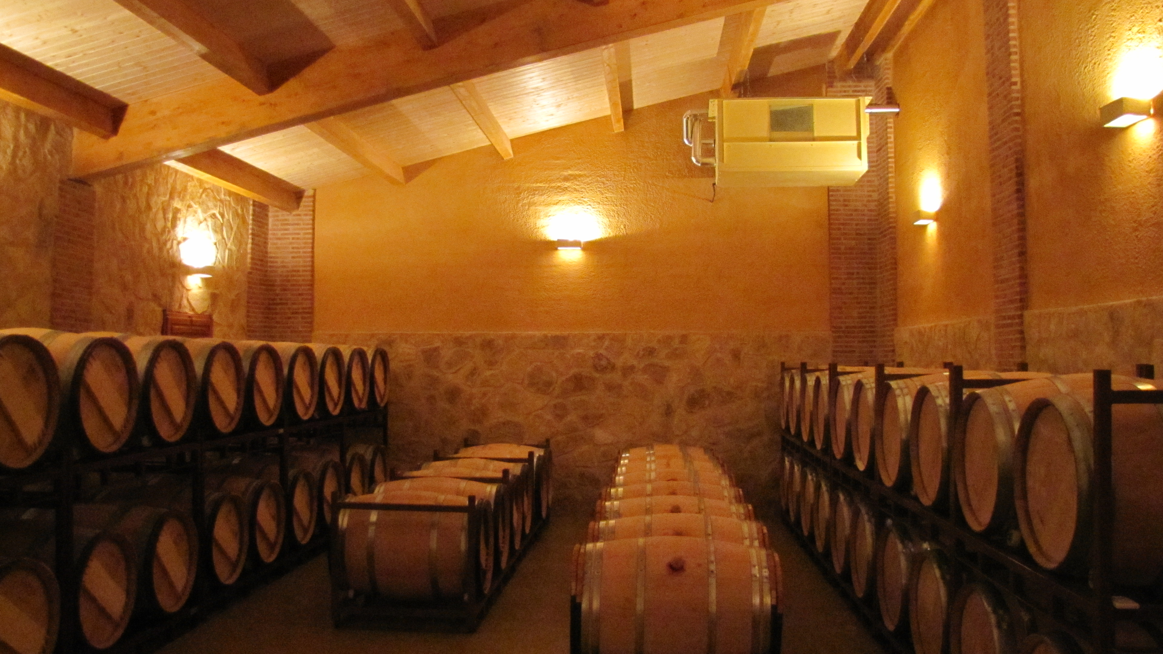 Bodega Subterránea de la bodega Viña Sastre - Hermanos Sastre, en la Ribera del Duero burgalesa, en el pueblo de La Horra. En la sala hay cientos de barricas, o cubas, llenas de vino.